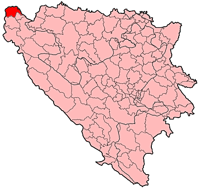 Općina Velika Kladuša u Bosni i Hercegovini